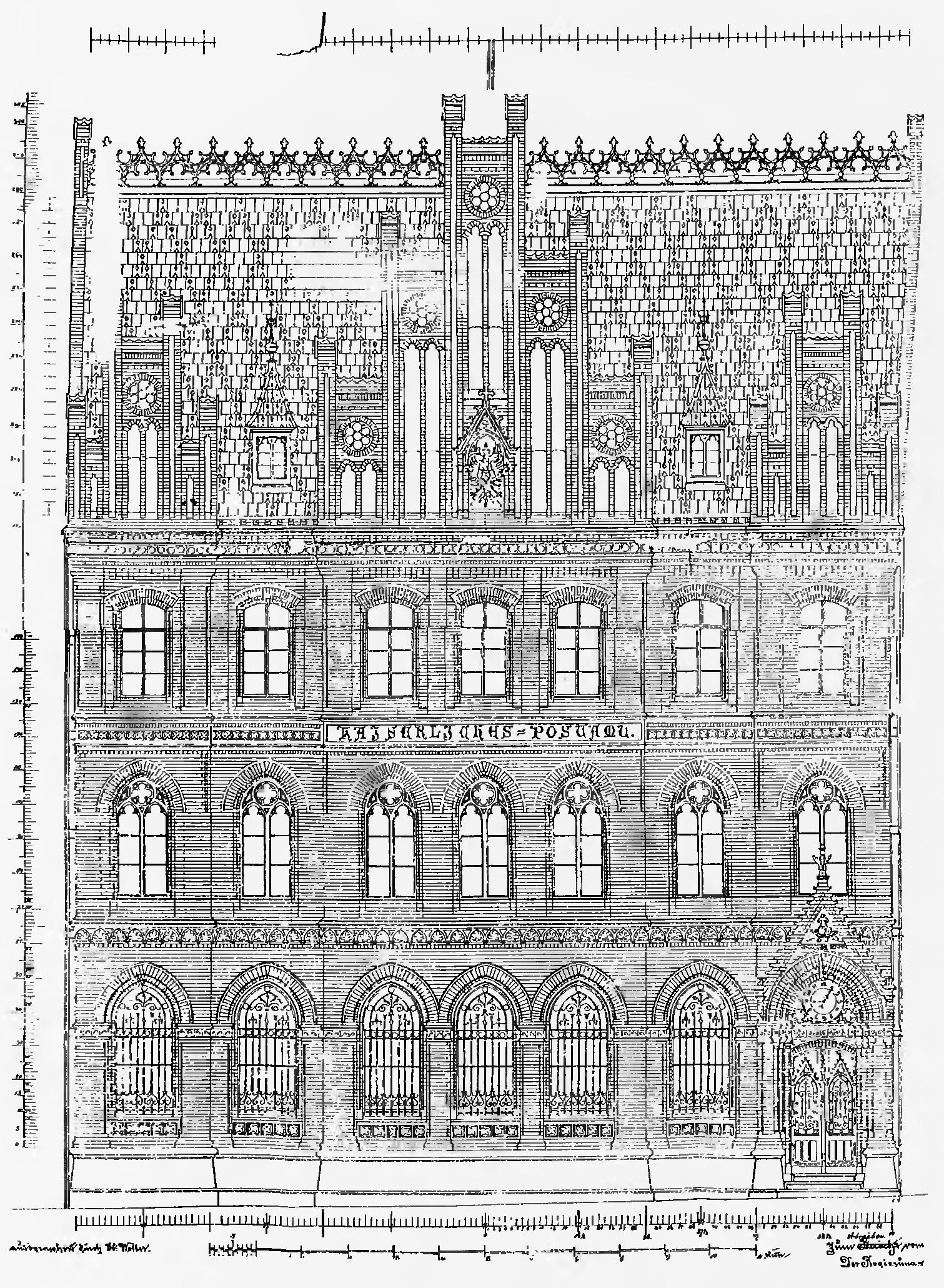 Projekt fasady urzędu pocztowego w Toruniu.